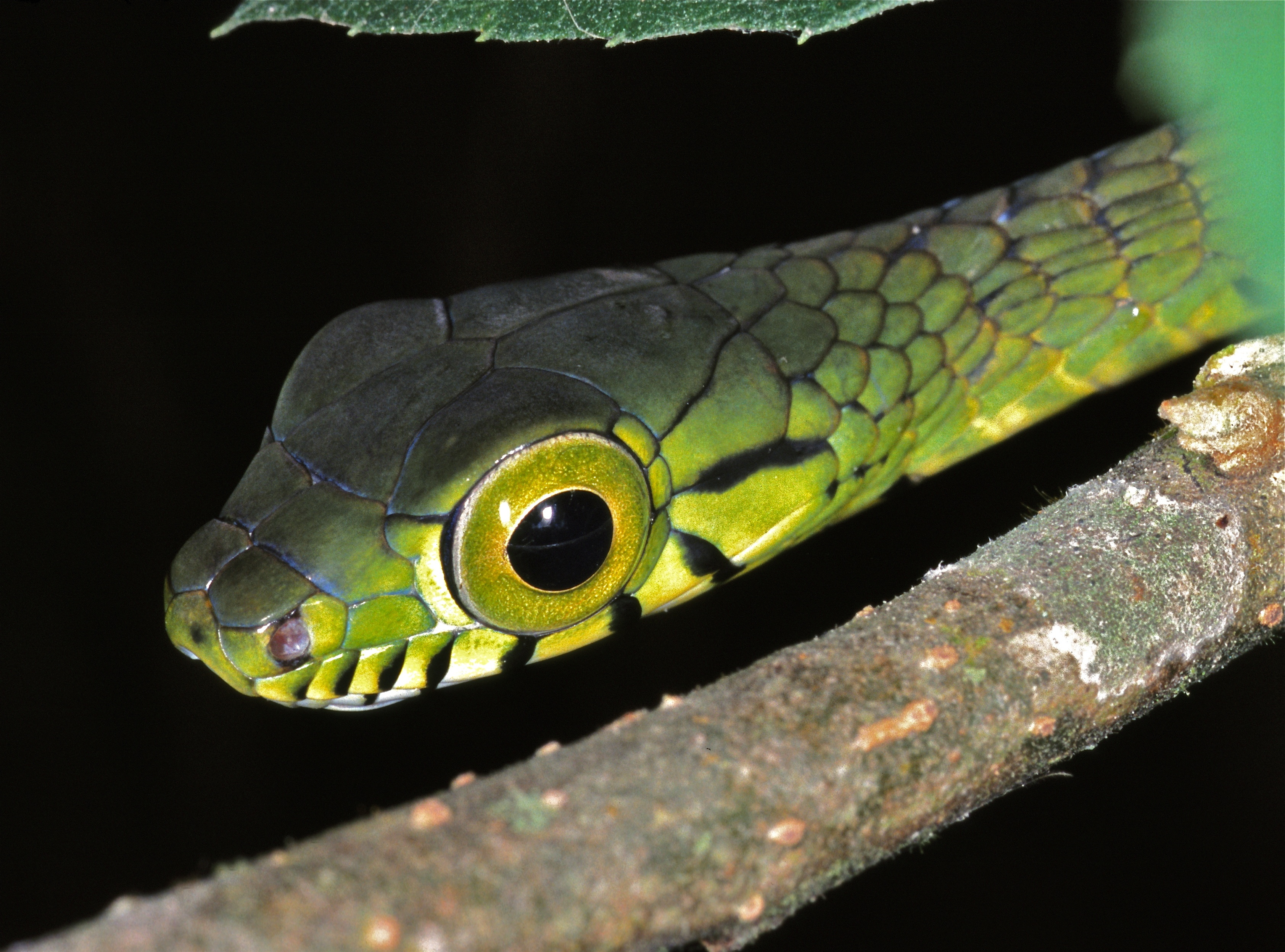 Korup NP, CAMEROON